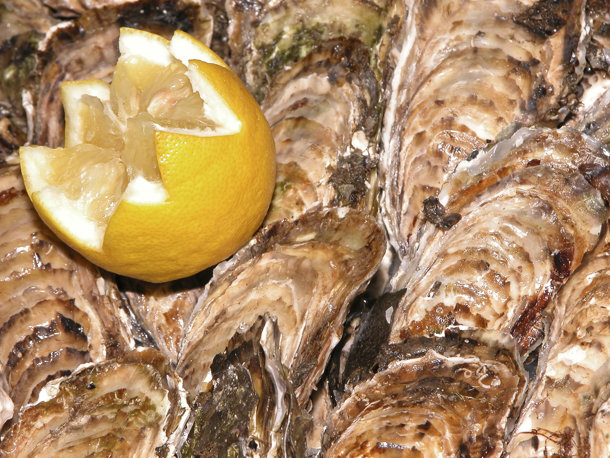 Huîtres de Bouzigues (étang de Thau)